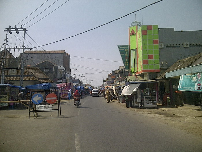 Kawasan Pasar dan Pertokoan Arjawinangun, Kecamatan Arjawinangun, Kabupaten Cirebon, Jawa Barat